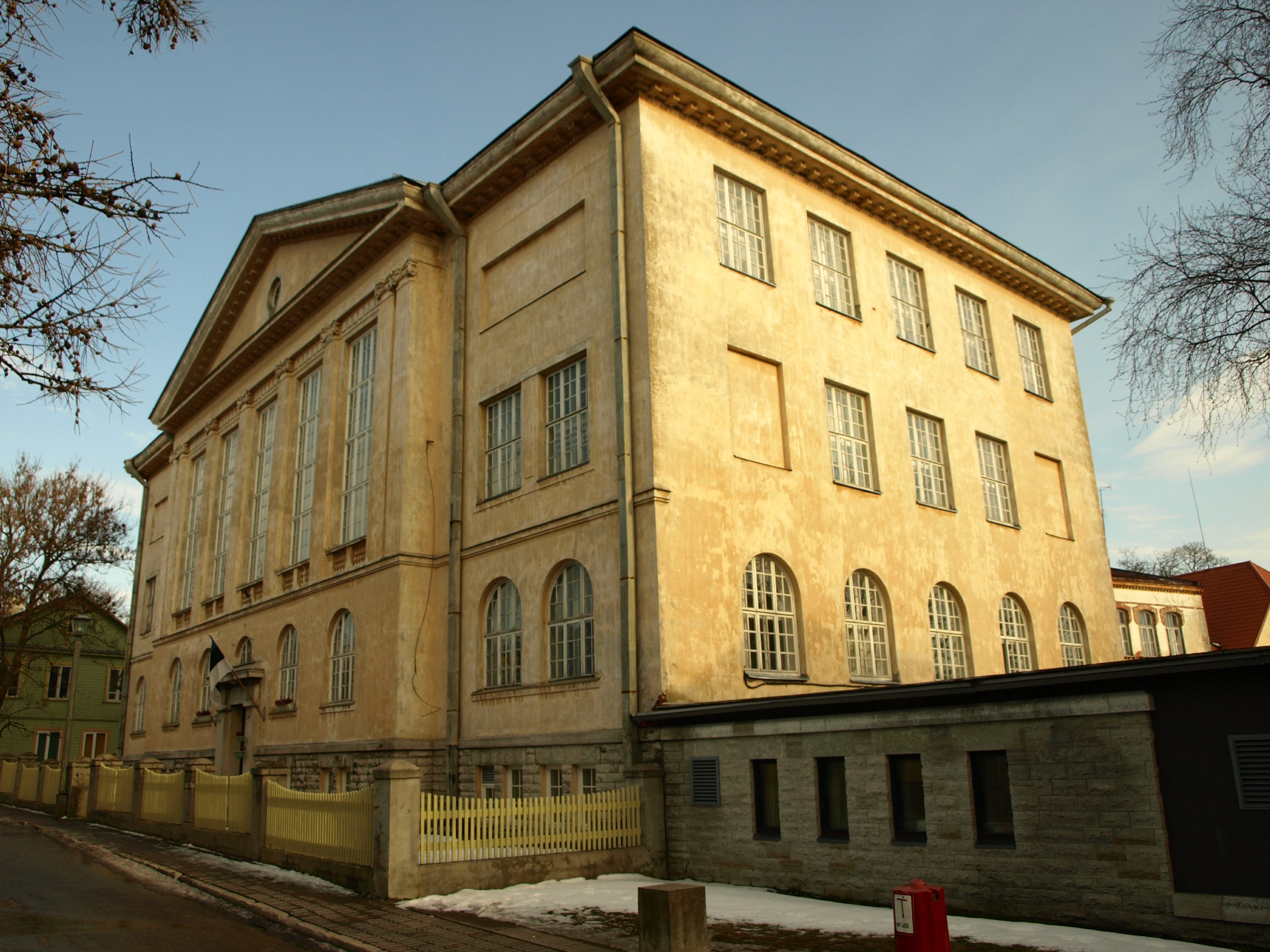 Koolihoonete kompleks 19.-20. saj.